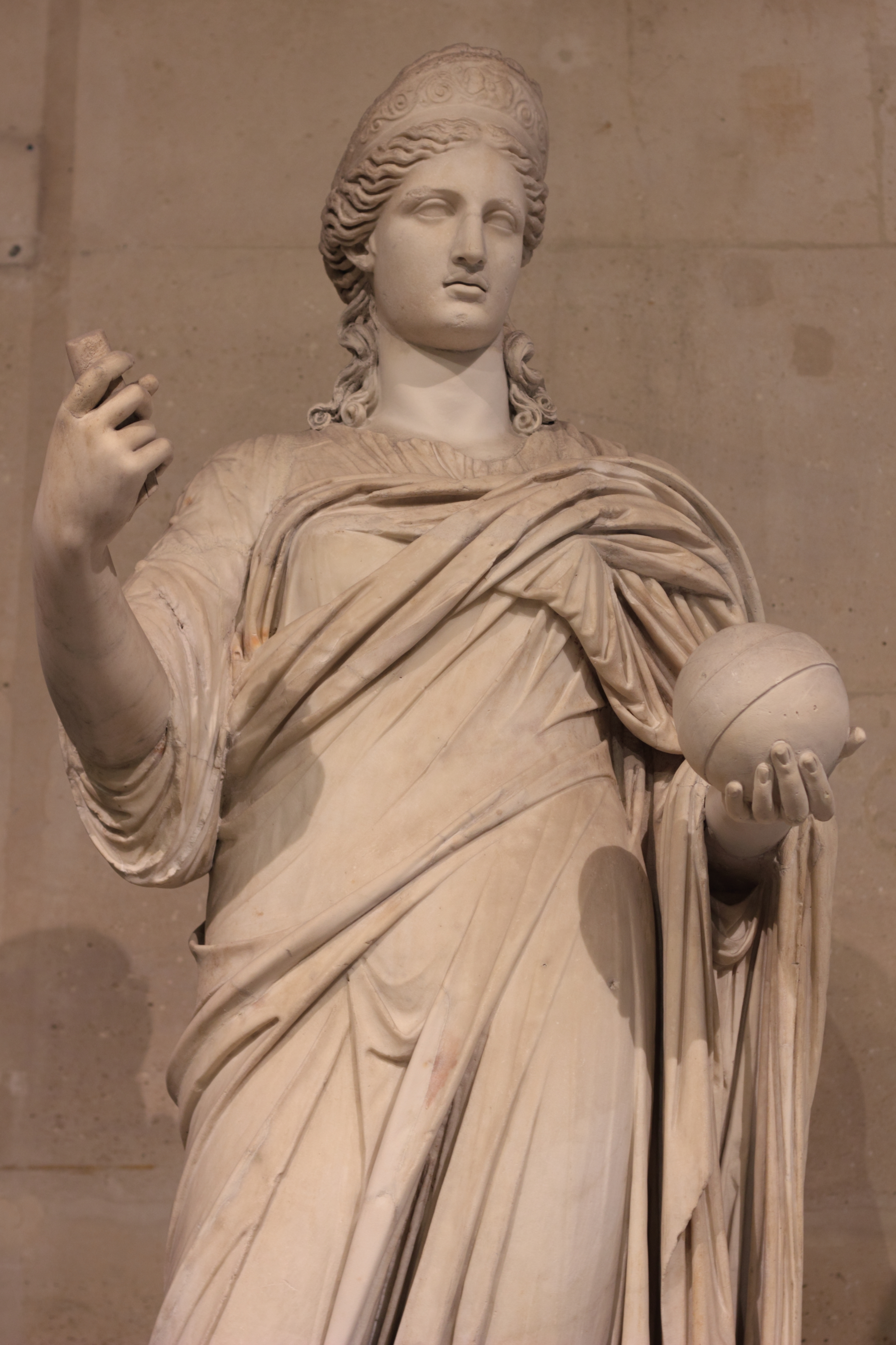 Statue de Junon, Louvre, Ma 485